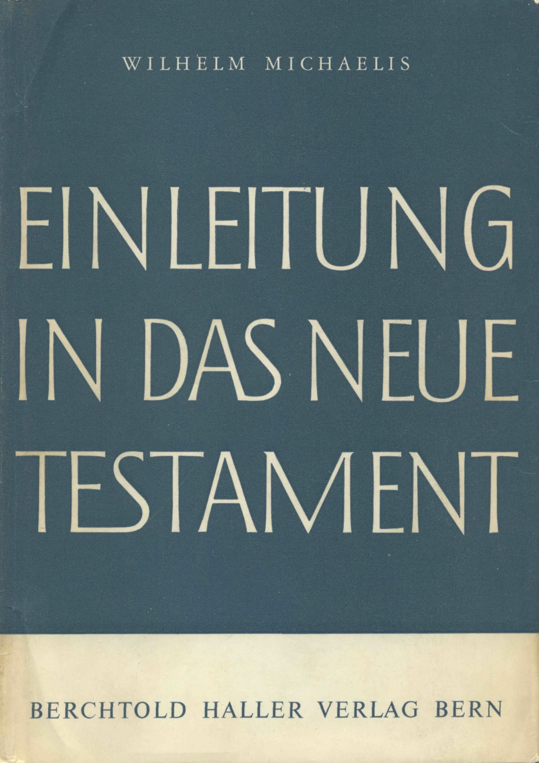 Buch-Umschlag (Vorderdeckel) von Wilhelm Michaelis: Einleitung in das Neue Testament, 3. Auflage, 1961